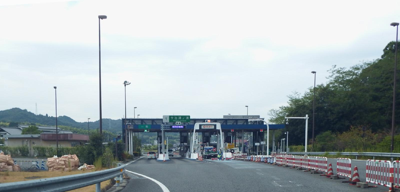 今治湯ノ浦インターチェンジ出口